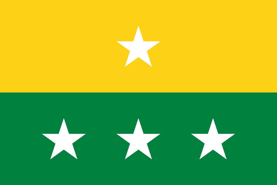 Bandera de 24 de Mayo